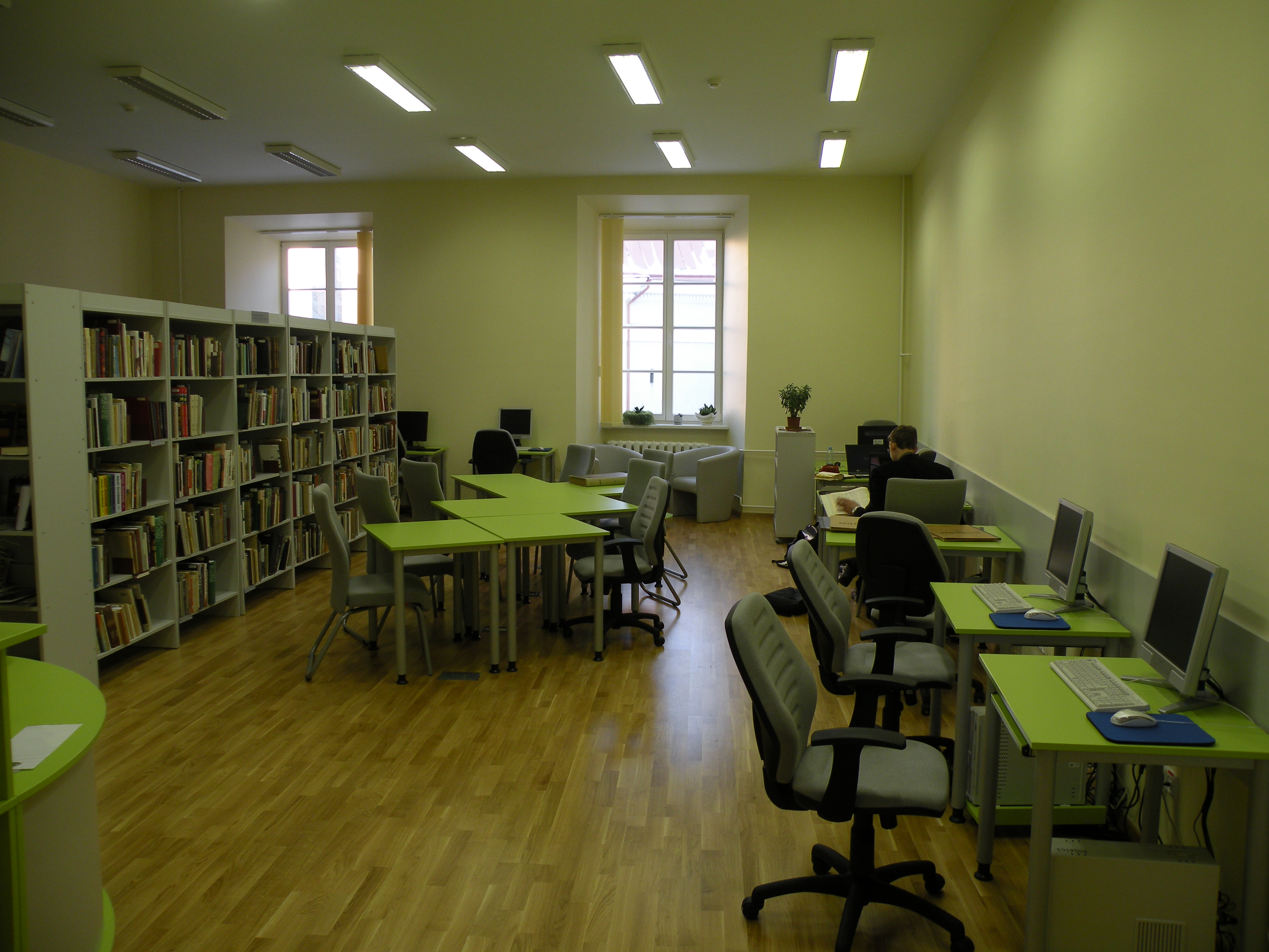 VU bibliotekos lituanistikos skaitykla